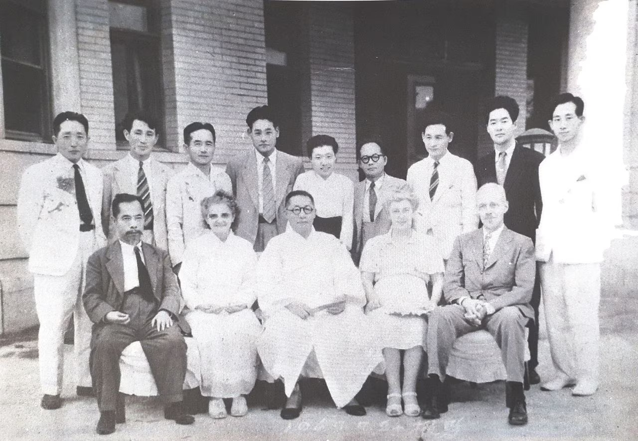 한국 방문 중 경교장에 찾아간 피치 박사 부부와 김구, 프란체스카, 안미생, 이기붕 등